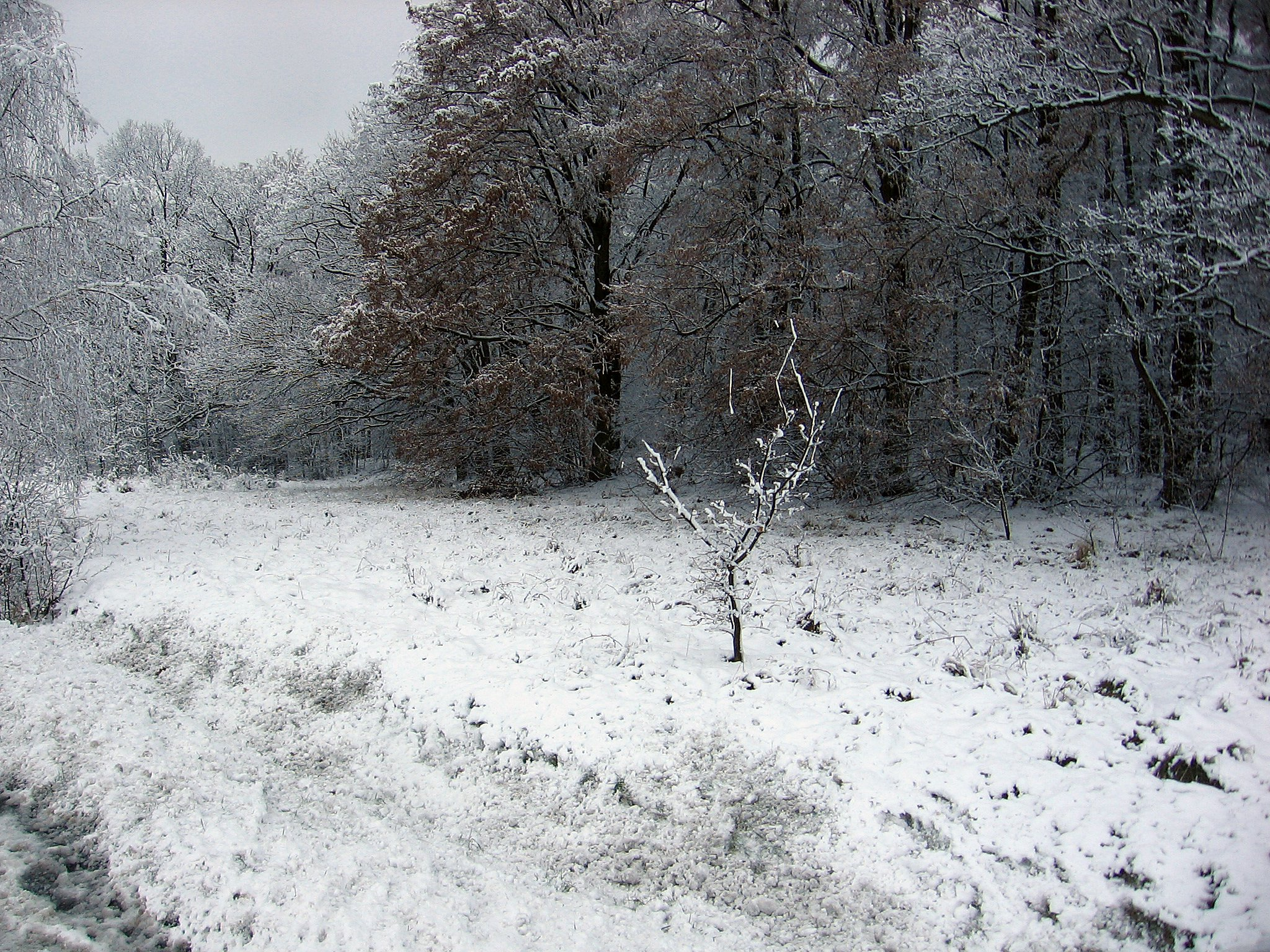 Las Mokrzański we Wrocławiu, widok z ul. Wińskiej róg Mojęcickiej